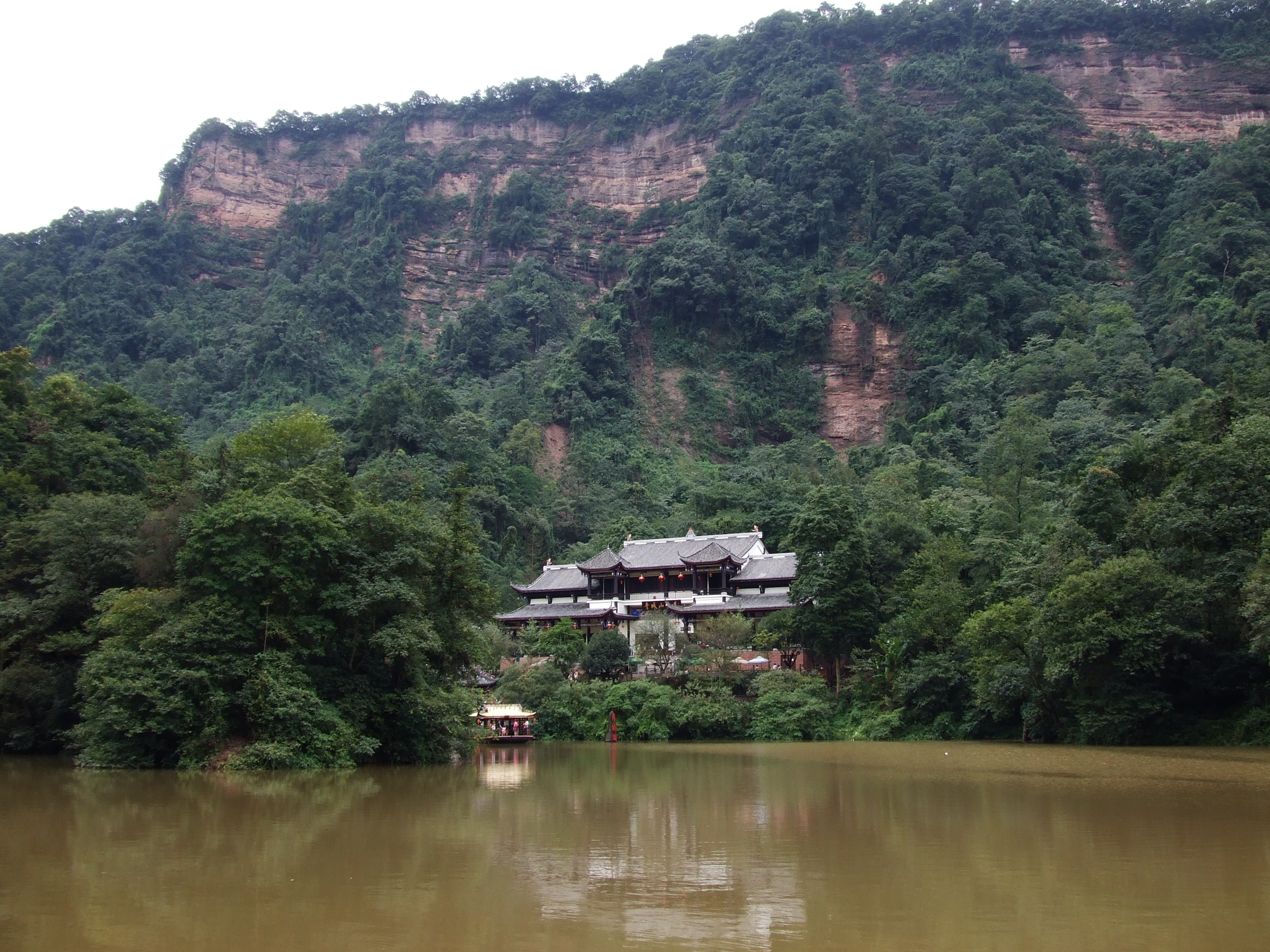 四川 青城山-索道下口站